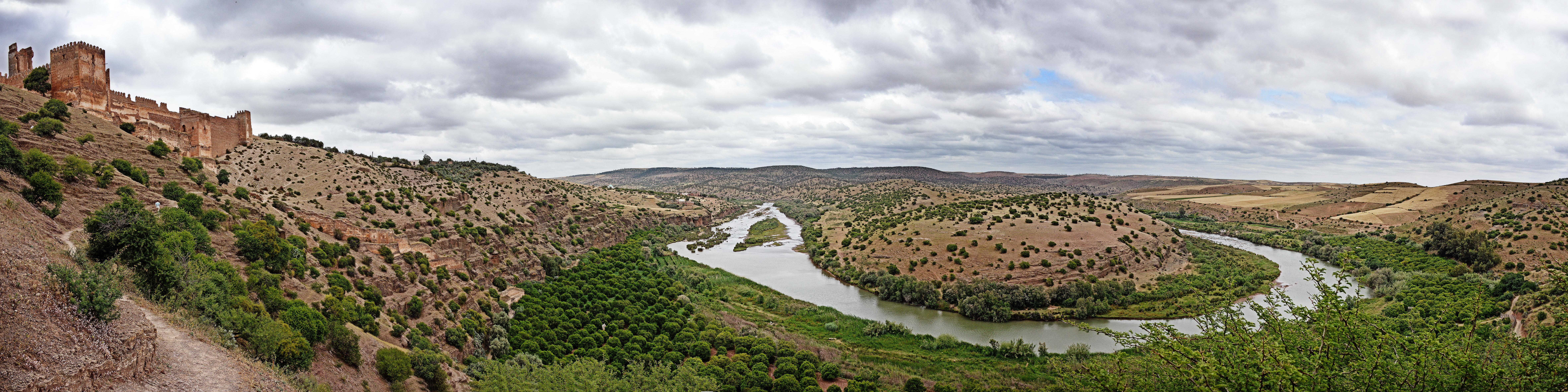 Les ruines de la Casbah de Boulaouane dominant les méandres de l'oued Oum Er-Rbia.